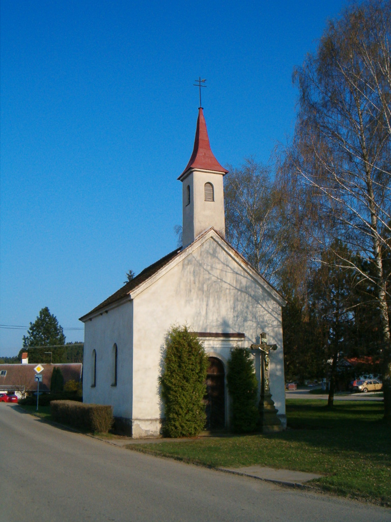 Kaple sv. Andělů ve Vnorovicích